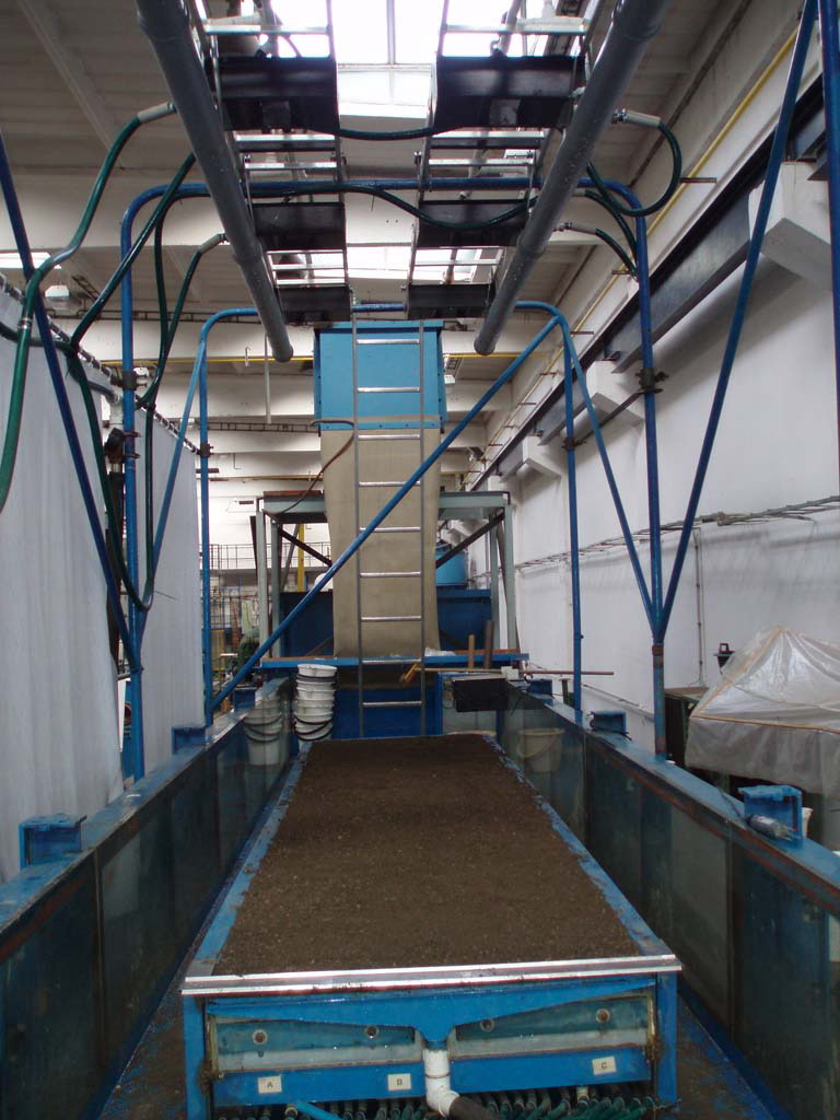 dešťový simulátor FSV ČVUT